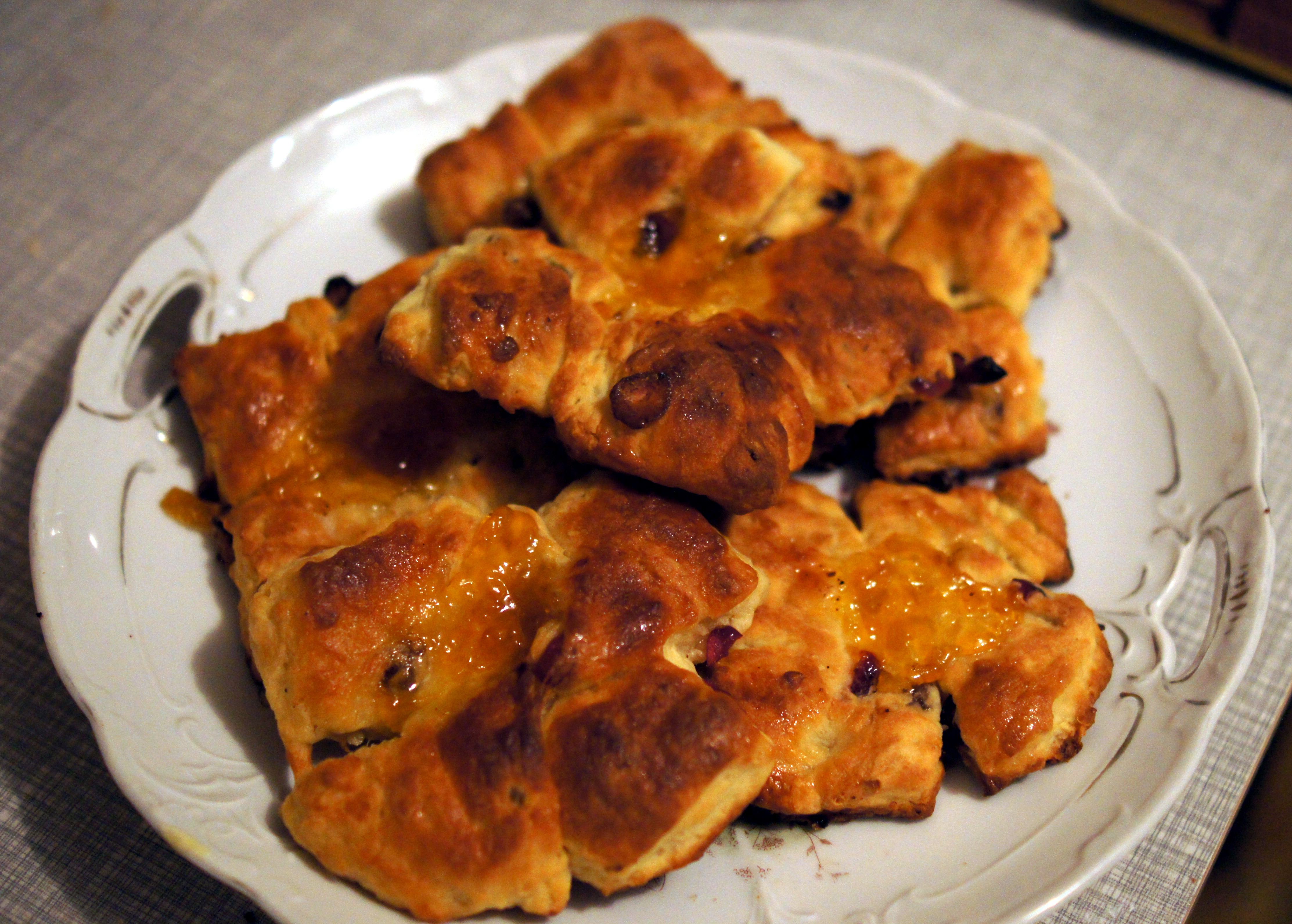 Frisch gebackene Reformationsbrötchen